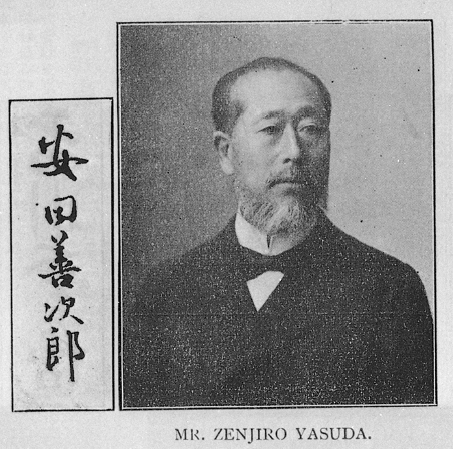 Portrait of Yasuda Zenjiro (安田善次郎, 1838 – 1921)